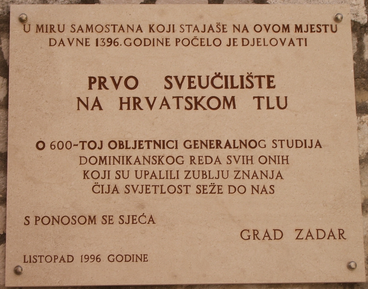 spomen ploča osnutku Sveučilišta u Zadru 1396.g